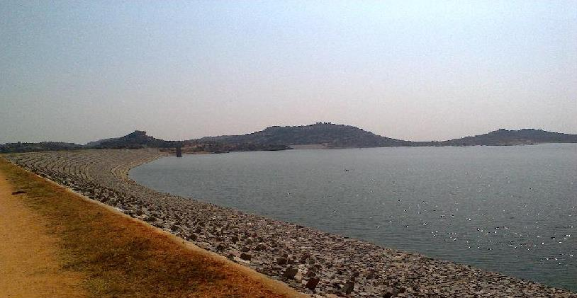 ర్యాలంపాడు రిజర్వాయర్